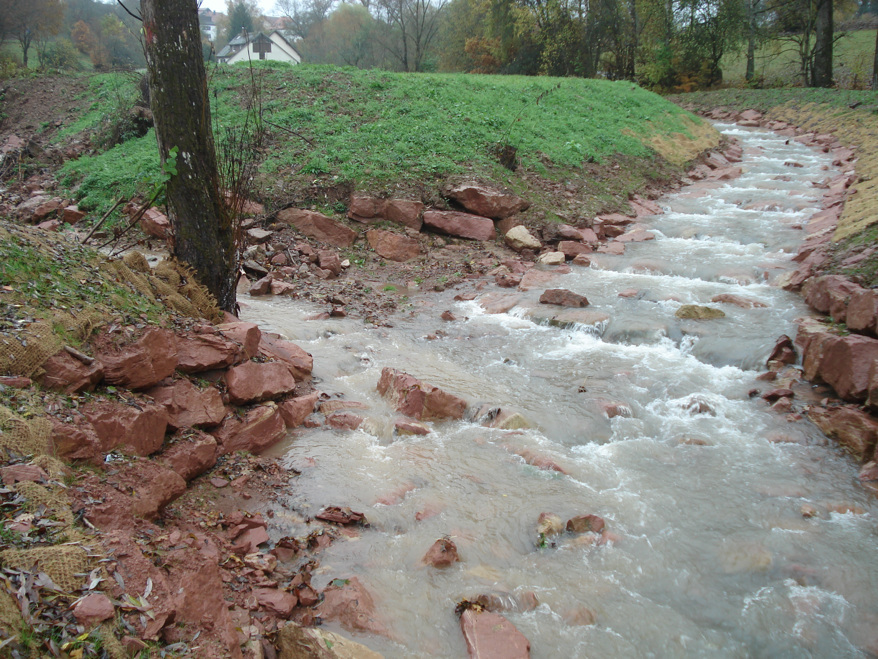 Der Hainsterbach (links) mündet in die Morre (von hinten nach vorne)